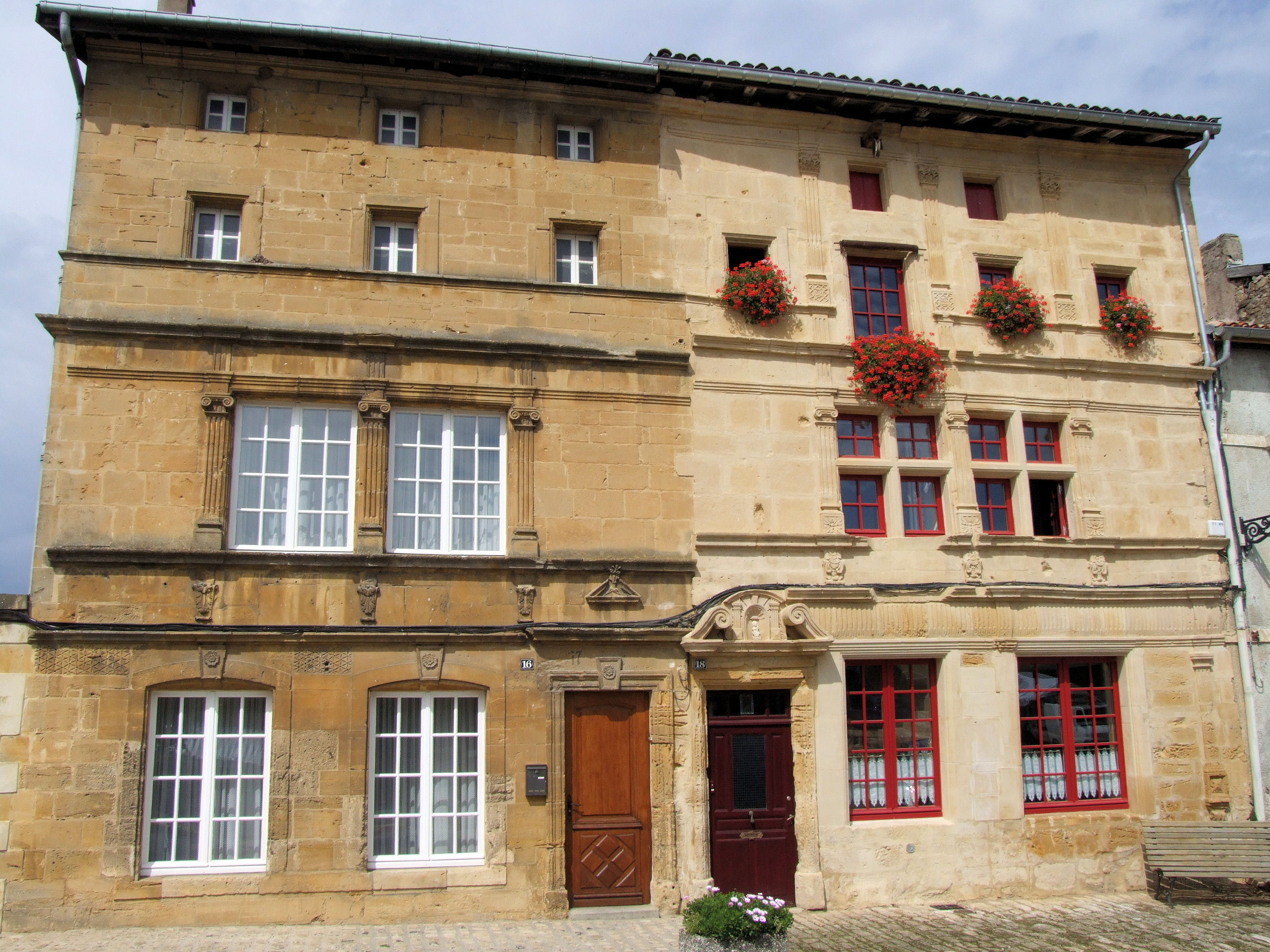 Maisons Renaissance à Marville (Meuse, France).